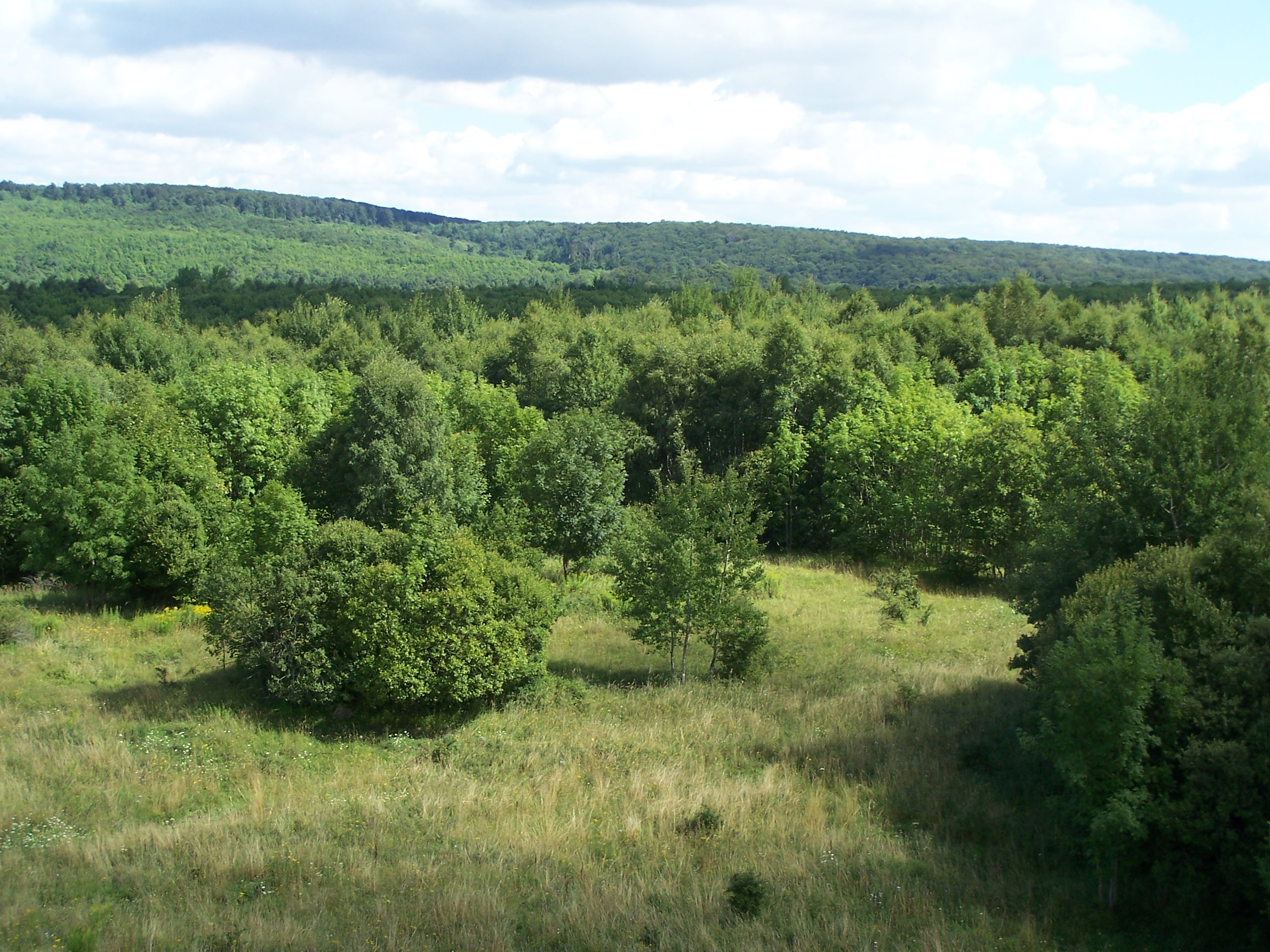 Aussichtsturm Hainichblick